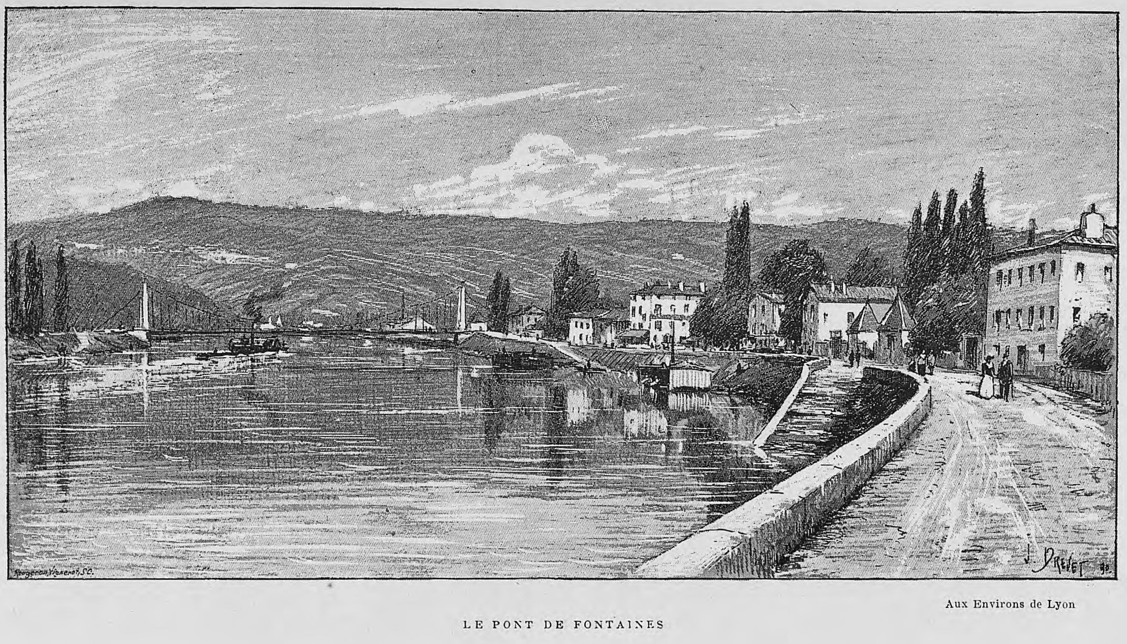 Aux environs de Lyon / Monsieur Josse ; préface de M. Coste-Labaume ; édition illustrée de 250 dessins de J. Drevet.